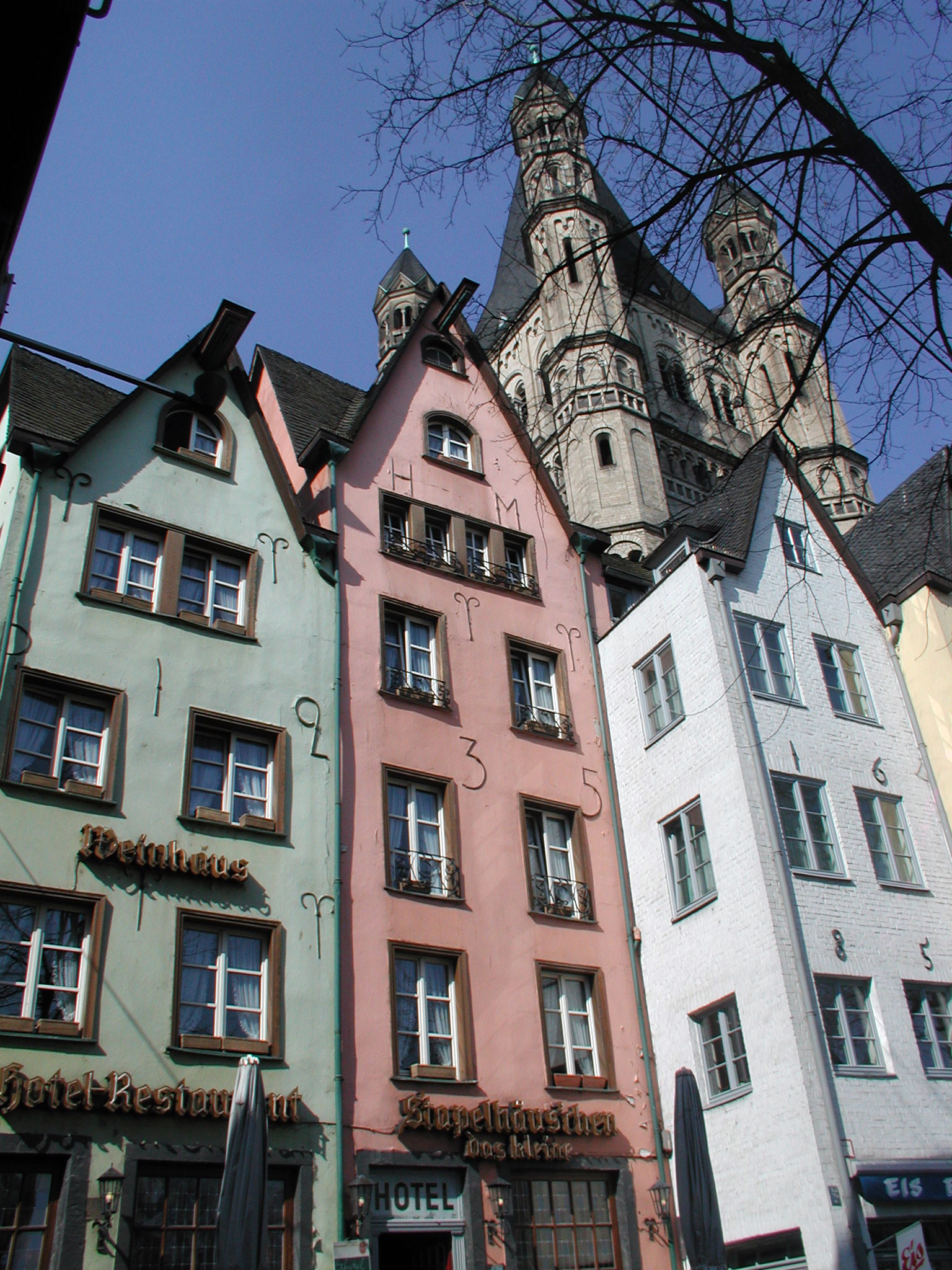 Kölner Altstadt, Stapelhäuschen am Fischmarkt, im Hintergrund der Vierungsturm von Groß St. Martin